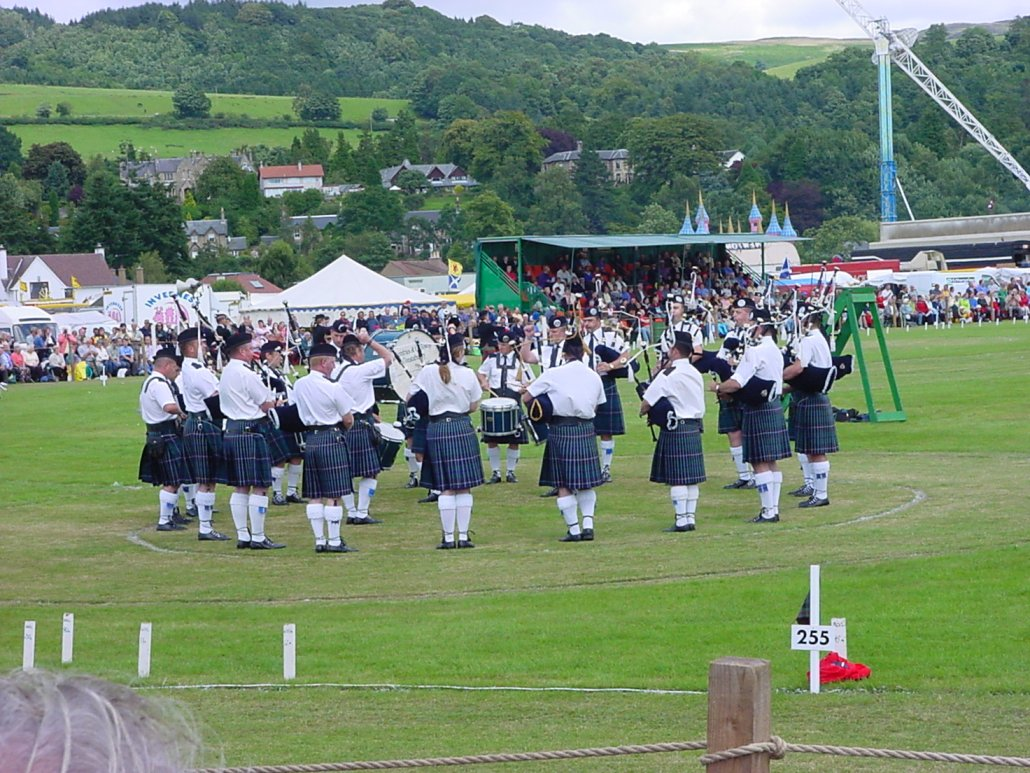 Highlandgames in Stirling (Schottland); Dudelsackspiel